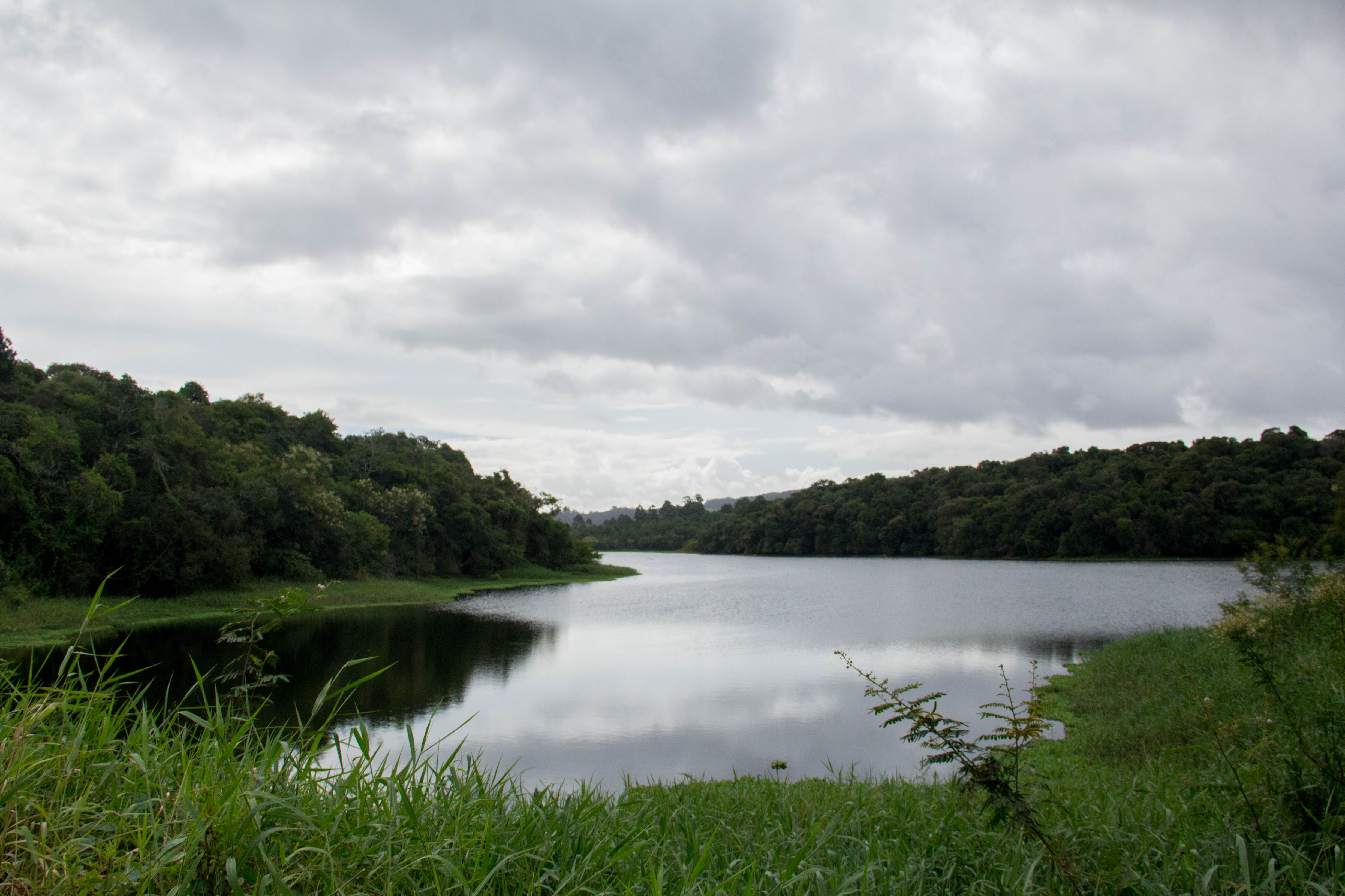 A barragem da Lomba do Sabão, criada em 1940. Data: 10 de março de 2015 Foto: Annie Castro